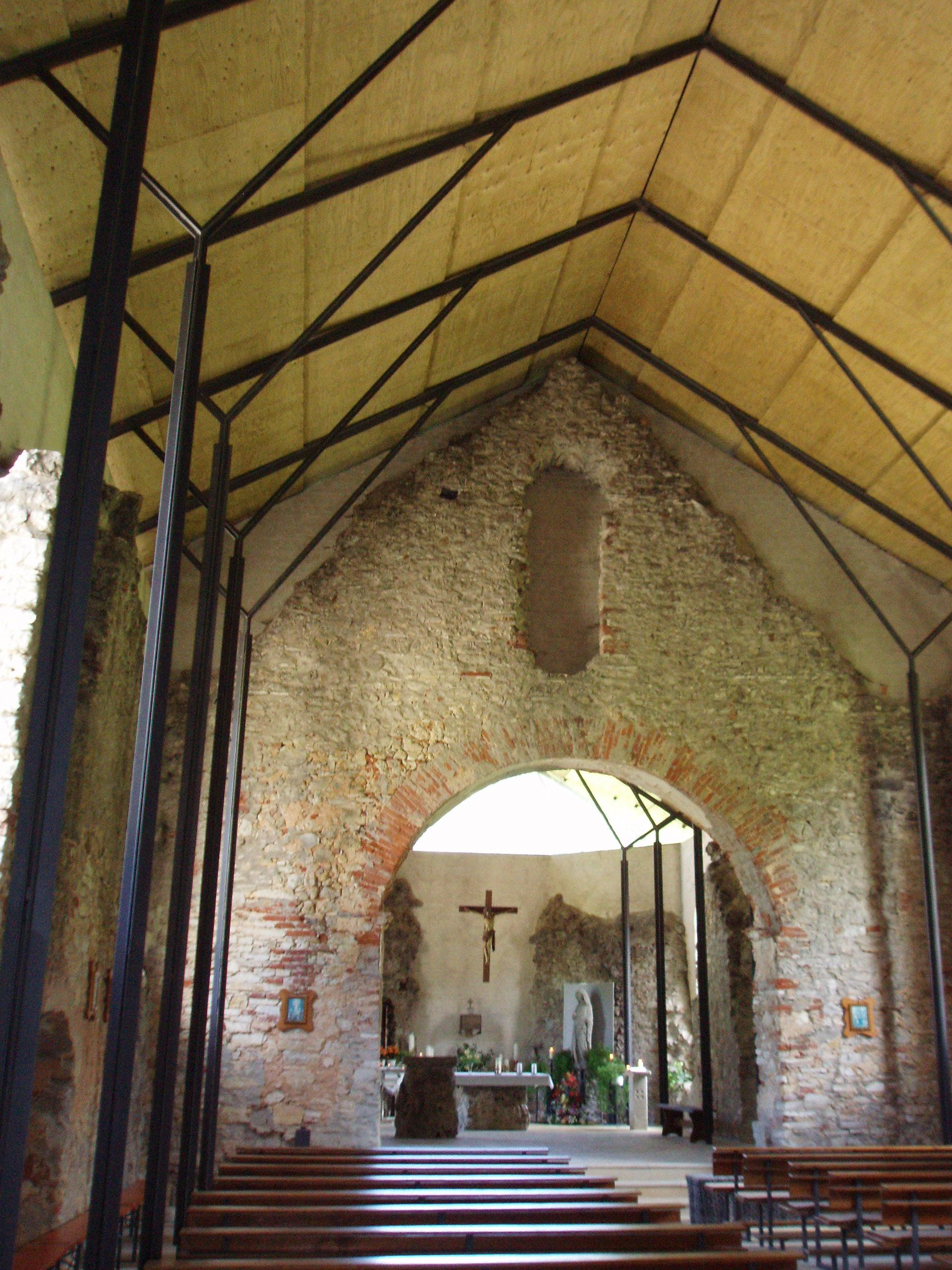 Spindeltal-Ruinenkirche, Innenansicht